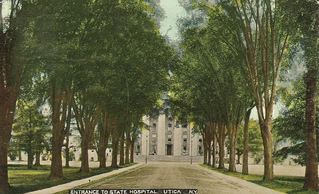 Entrance to State Hospital, Utica, NY